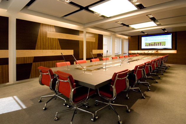 Sala del Consiglio Inarcassa